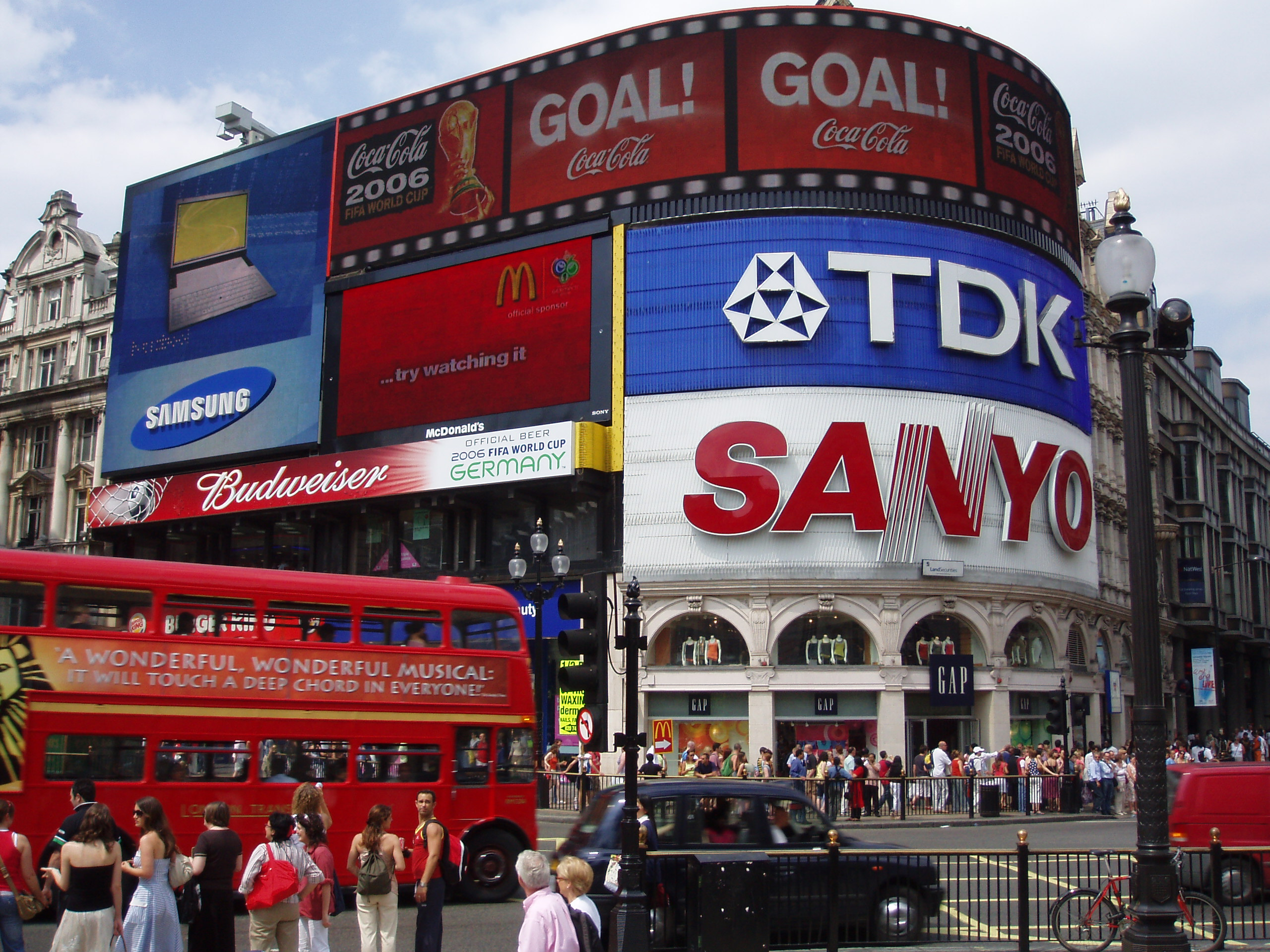 Plaza de Piccadilly Circus en Londres